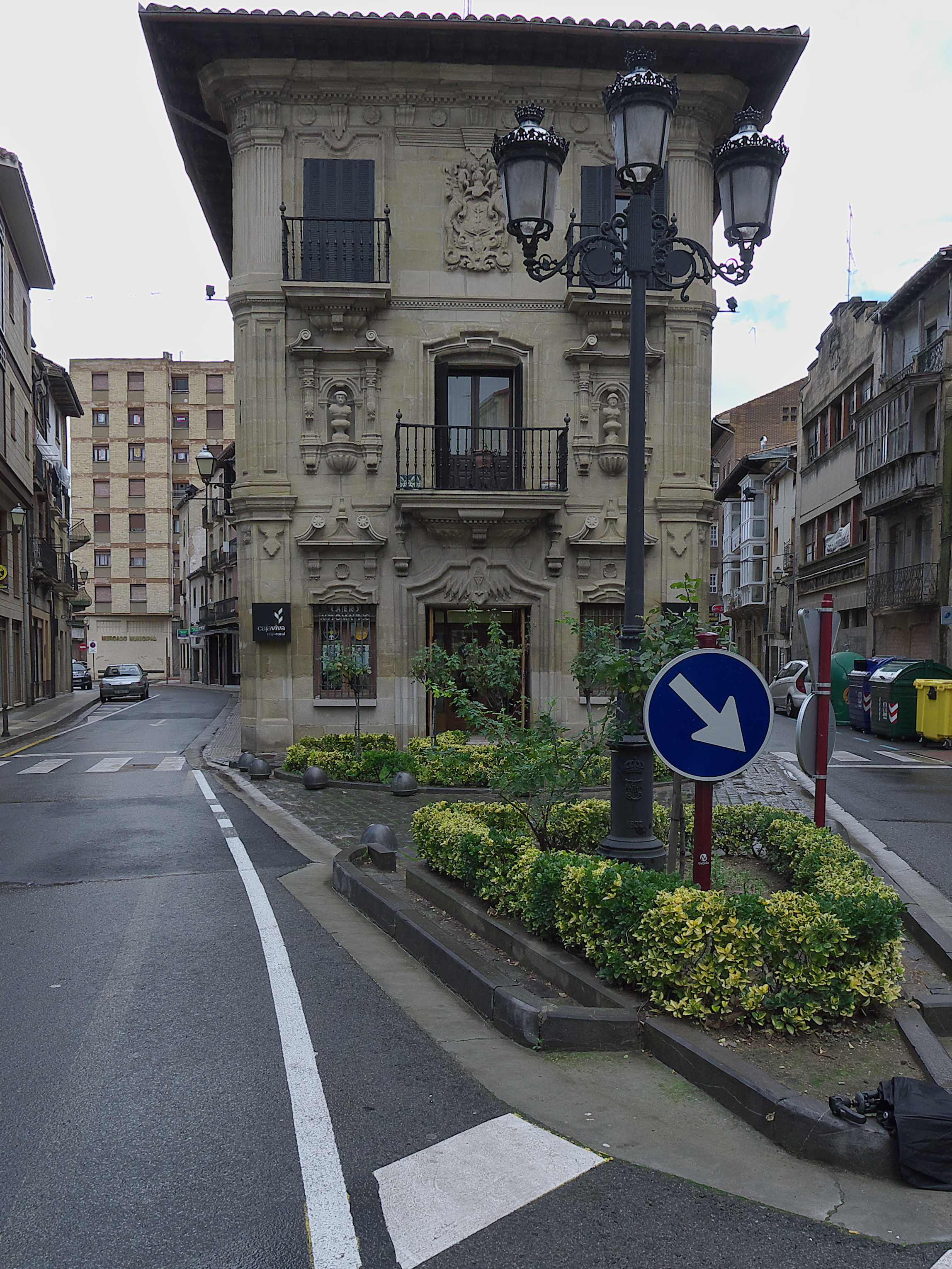 Fachada de la casa-palacio de Teodoro Tejada, uno de sus propietarios. Datado en en siglo XVIII por lo que une al barroco elementos neoclásicos.